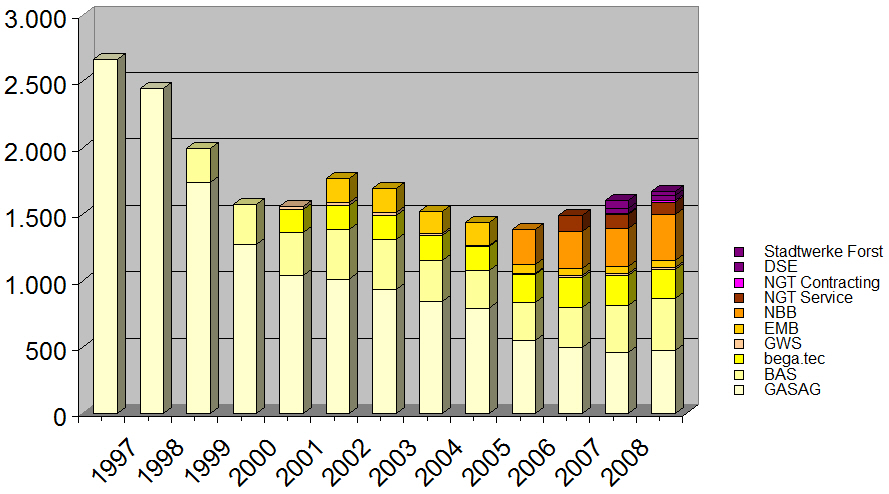 Mitarbeiterzahl GASAG-Konzern seit 1997